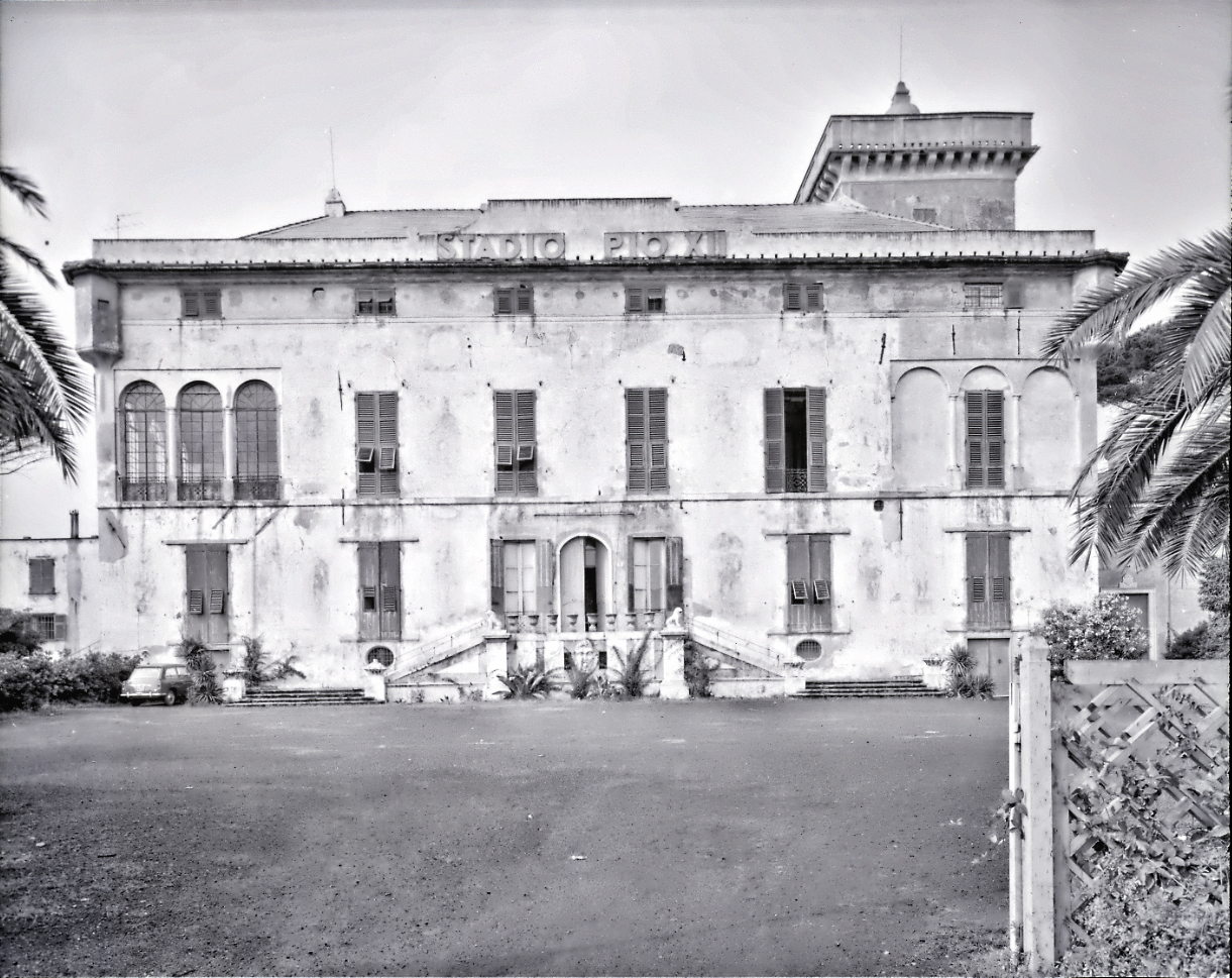 Servizio fotografico : Genova, 1963 / Paolo Monti. - Buste: 10, Fototipi: 10 : Negativo b/n, gelatina bromuro d'argento/ pellicola ; 10x12. - ((Serie costituita da 10 buste sciolte di negativi identificati con i nn.: 7034, 7035, 7036, 7037, 7038, 7039, 7040, 7041, 7042, 7043. - Il negativo identificato con il numero 46397 è stato realizzato per Zodiac. - Occasione: Documentazione per la pubblicazione: Italia Nostra (a cura di), "Le ville genovesi", catalogo della mostra, Genova 1962, Genova, Comune di Genova, 1967. - Fonte: Monografia di Italia Nostra (a cura di): Le ville genovesi, catalogo della mostra, Genova 1962, Genova, Comune di Genova (1967). - Fonte: Lettera di Paolo Monti: I. Carteggi/ Genova - Enrico (1963-1966), presso Archivio Paolo Monti. Camicia con documenti dattiloscritti e manoscritti vari relativi al lavoro eseguito per Italia Nostra: preventivi, lettere, inventari. - Fonte: Rubrica di Paolo Monti: Archivio fino 1-4-1961/ 31-3-1963 (1961-1963), presso Archivio Paolo Monti. - Fonte: Agenda di Paolo Monti: R 1 - Monti/ 1 aprile 1963 - 6 giugno 1964/ 6000-8193 (1963-1964), presso Archivio Paolo Monti